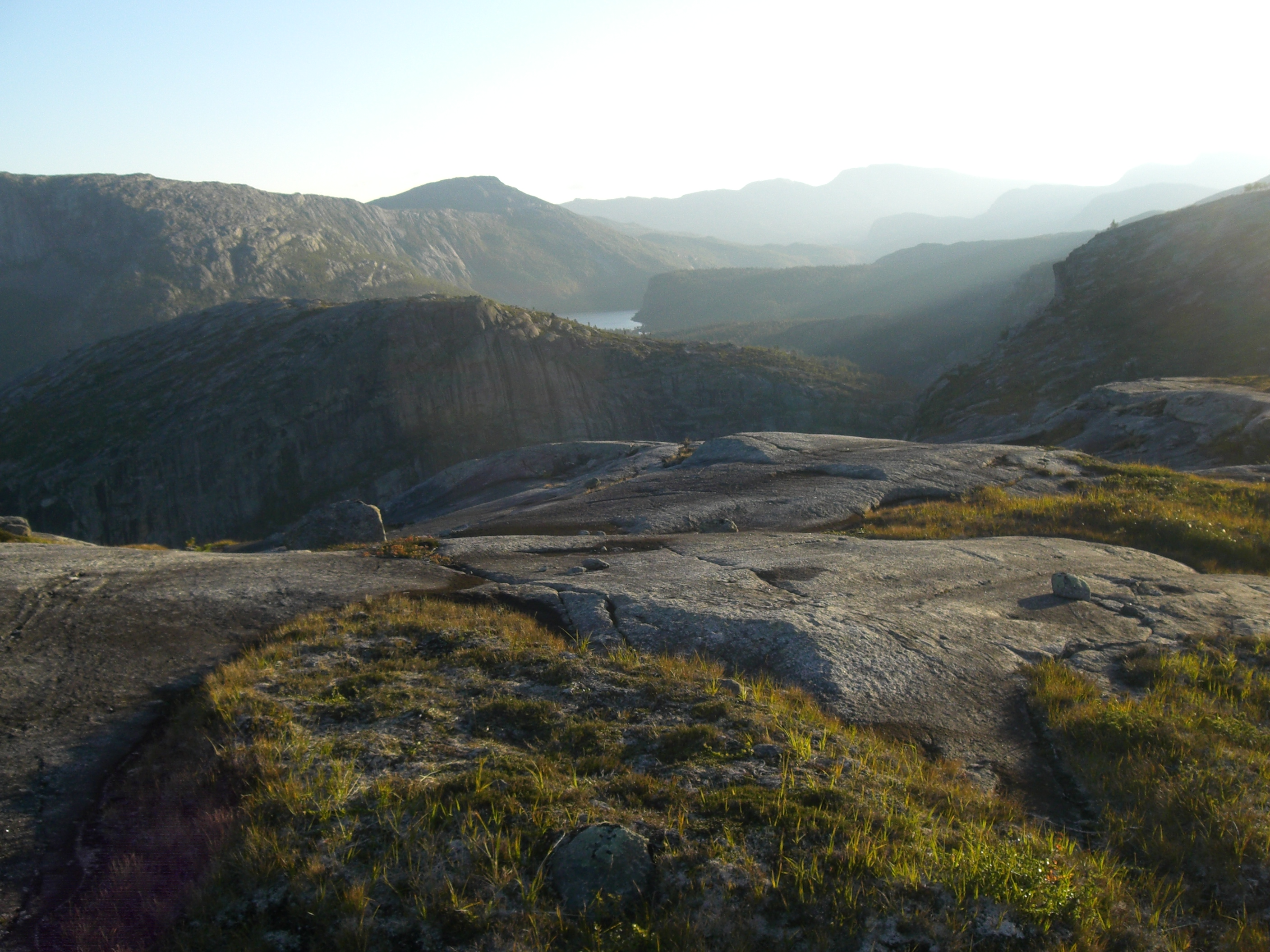 ... by sunset